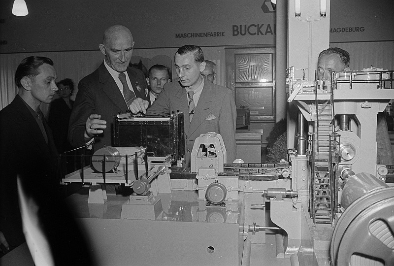 Original image description from the Deutsche Fotothek Fachbesucher vor einer Maschine der Firma Buckau-Wolf Magdeburg